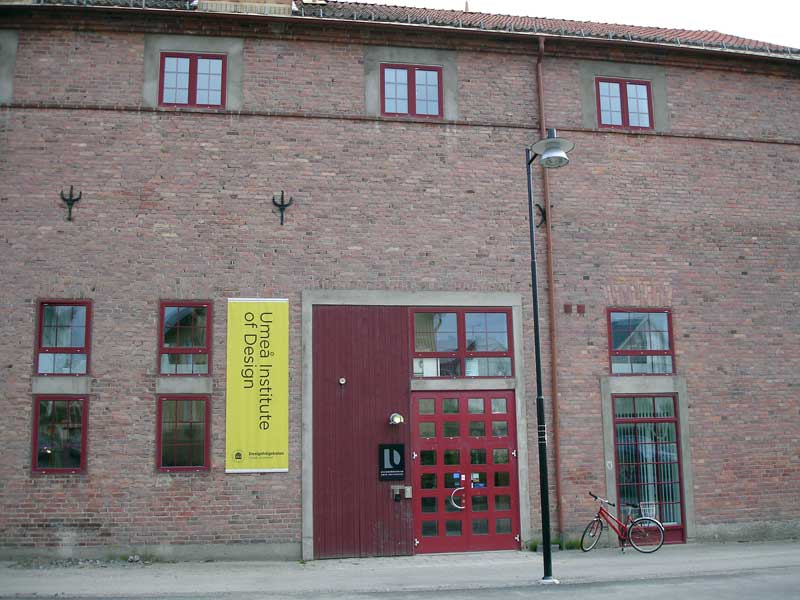 Designhögskolan i Umeå är delvis inrymd i en gammal transformatorstation som ritades av Robert Laurell för Umeå träsliperi.